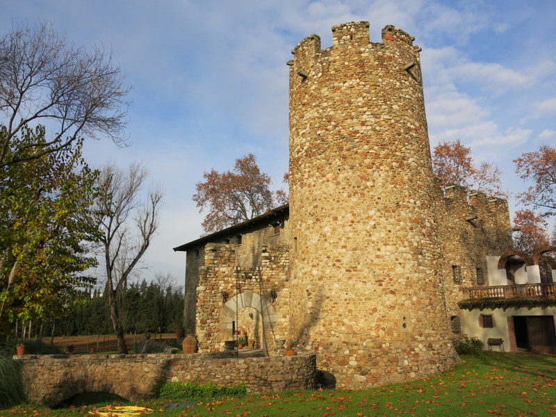 Casal de Cellers a Parets del Vallès - Catalunya